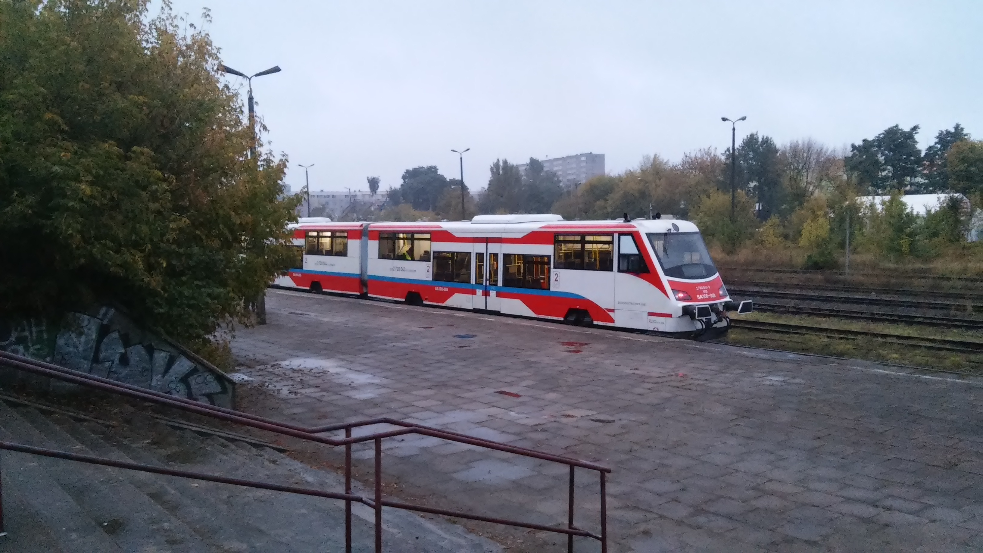 Pociąg REGIO przy peronie pierwszym stacji Białystok Fabryczny w dniu 22 września 2014 roku.